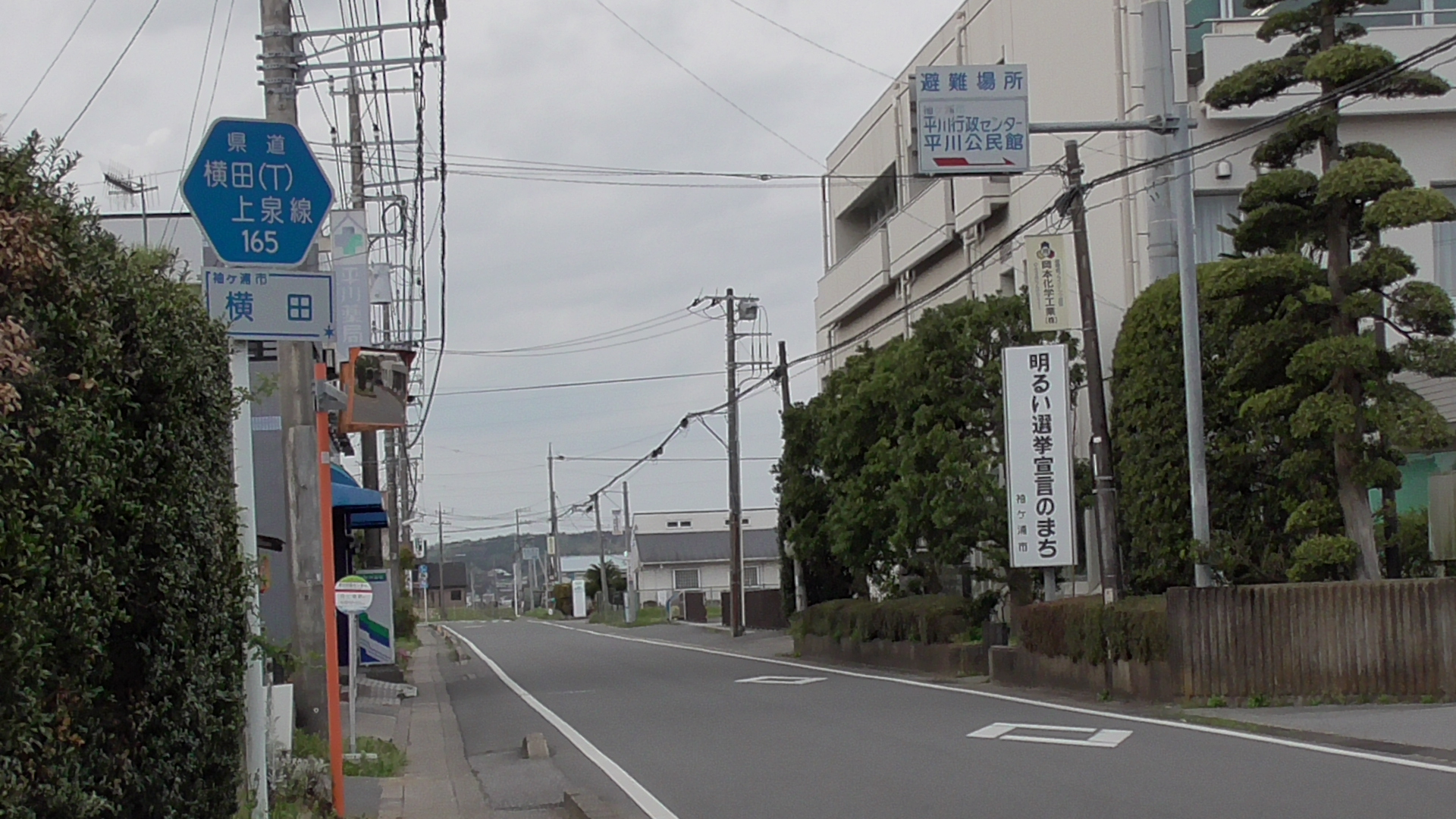 千葉県袖ヶ浦市内を通る千葉県道165号横田停車場上泉線。写真は起点付近でありこの近くにJR東日本久留里線の横田駅がある。